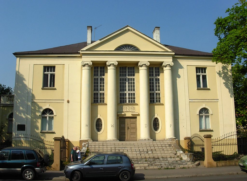 Aleja Ossolińskich 7 w Bydgoszczy